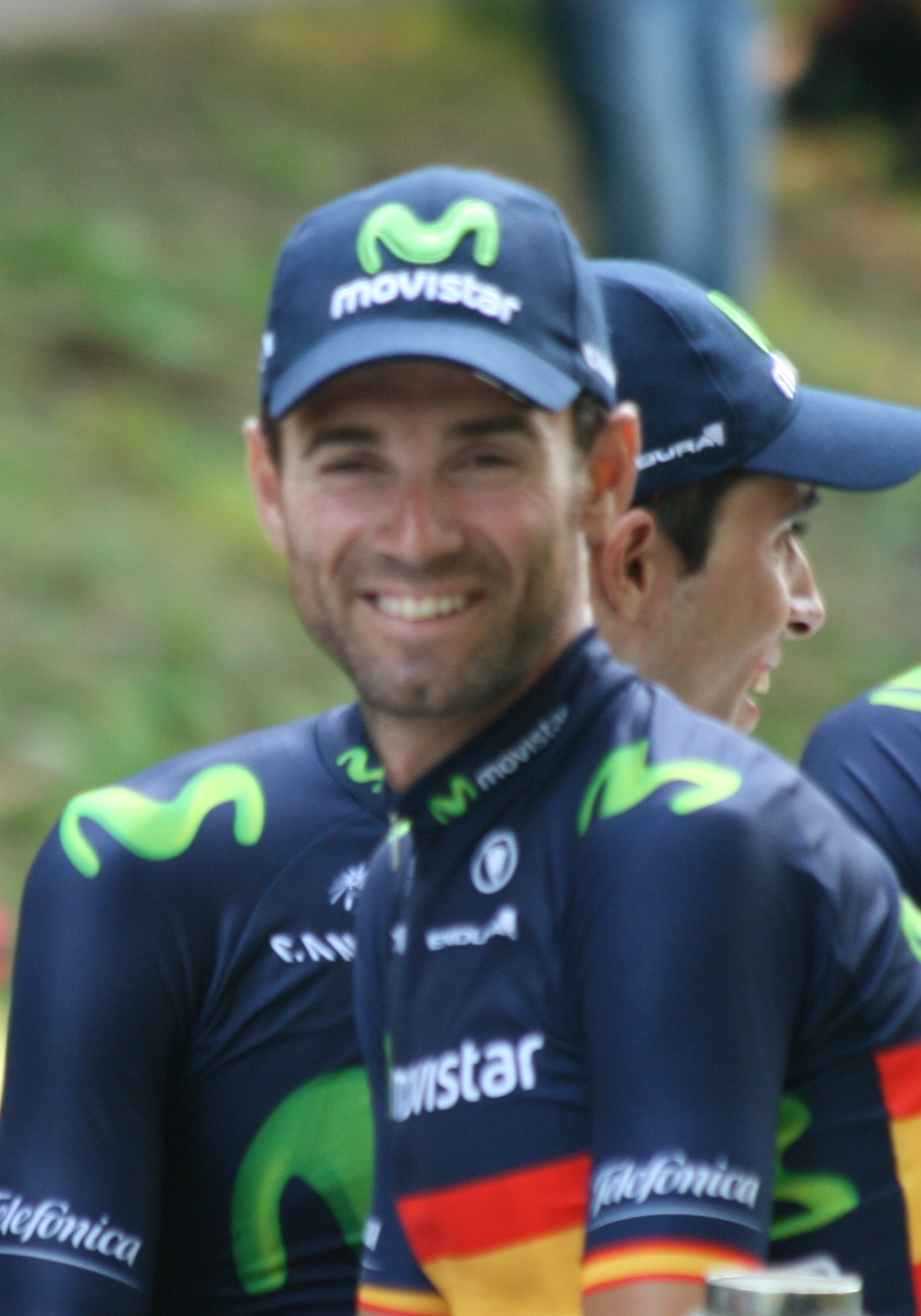 ploegenpresentatie Tour de France 2015 Utrecht